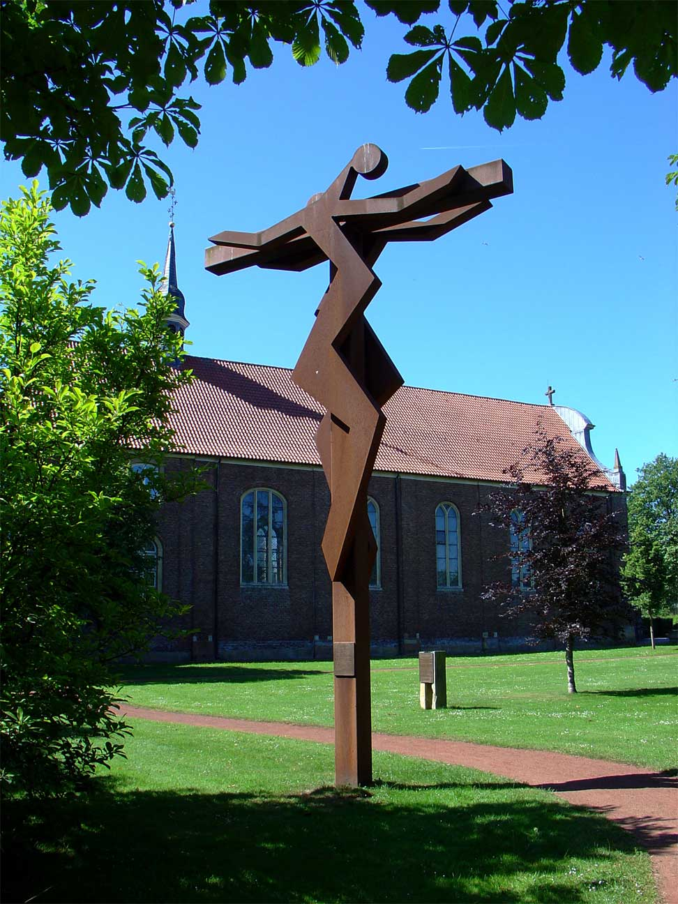 Doppel Korpus Kreuz door Adolf Erning in Zwillbrock (2001)